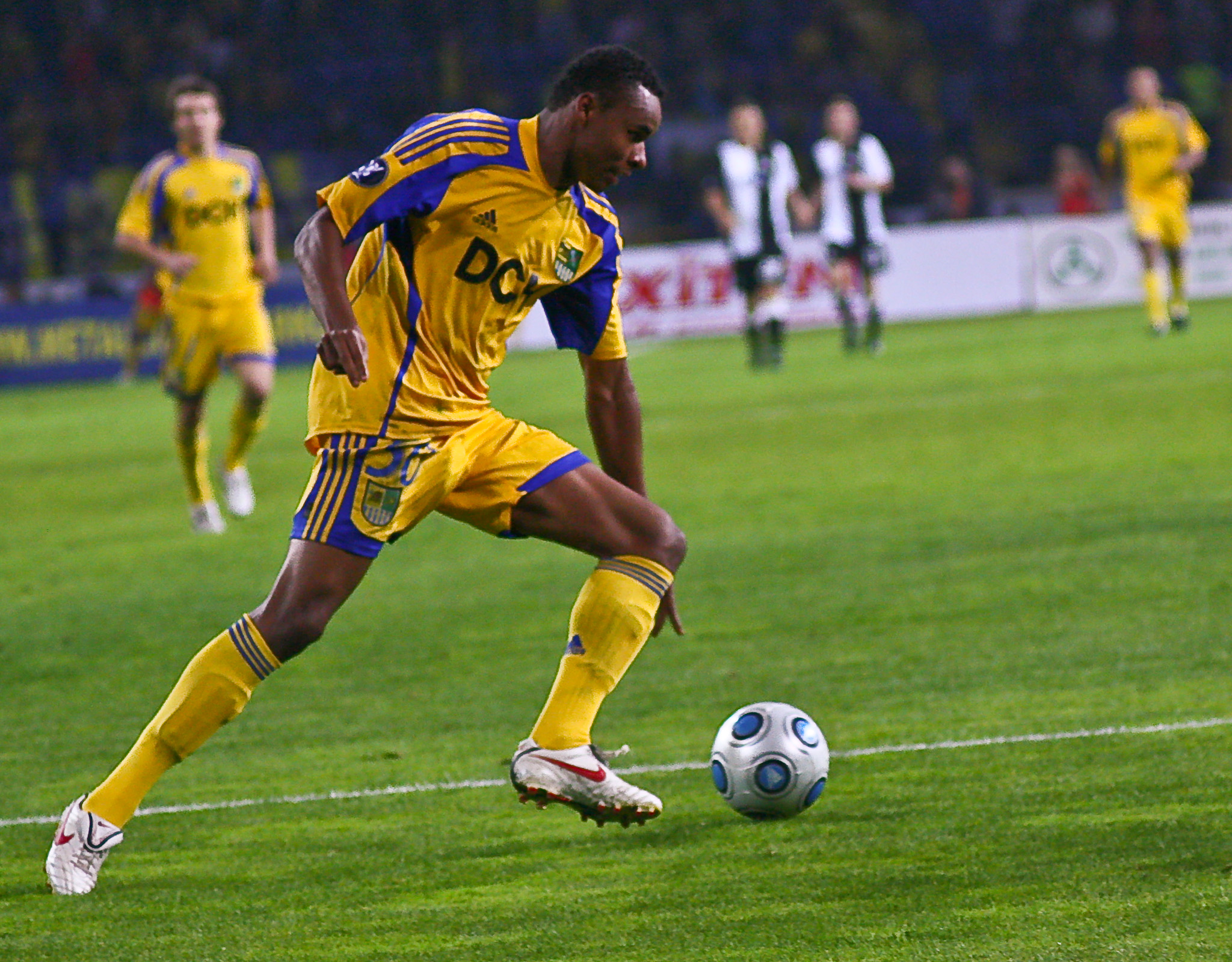 Джексон Жажа Коэльо